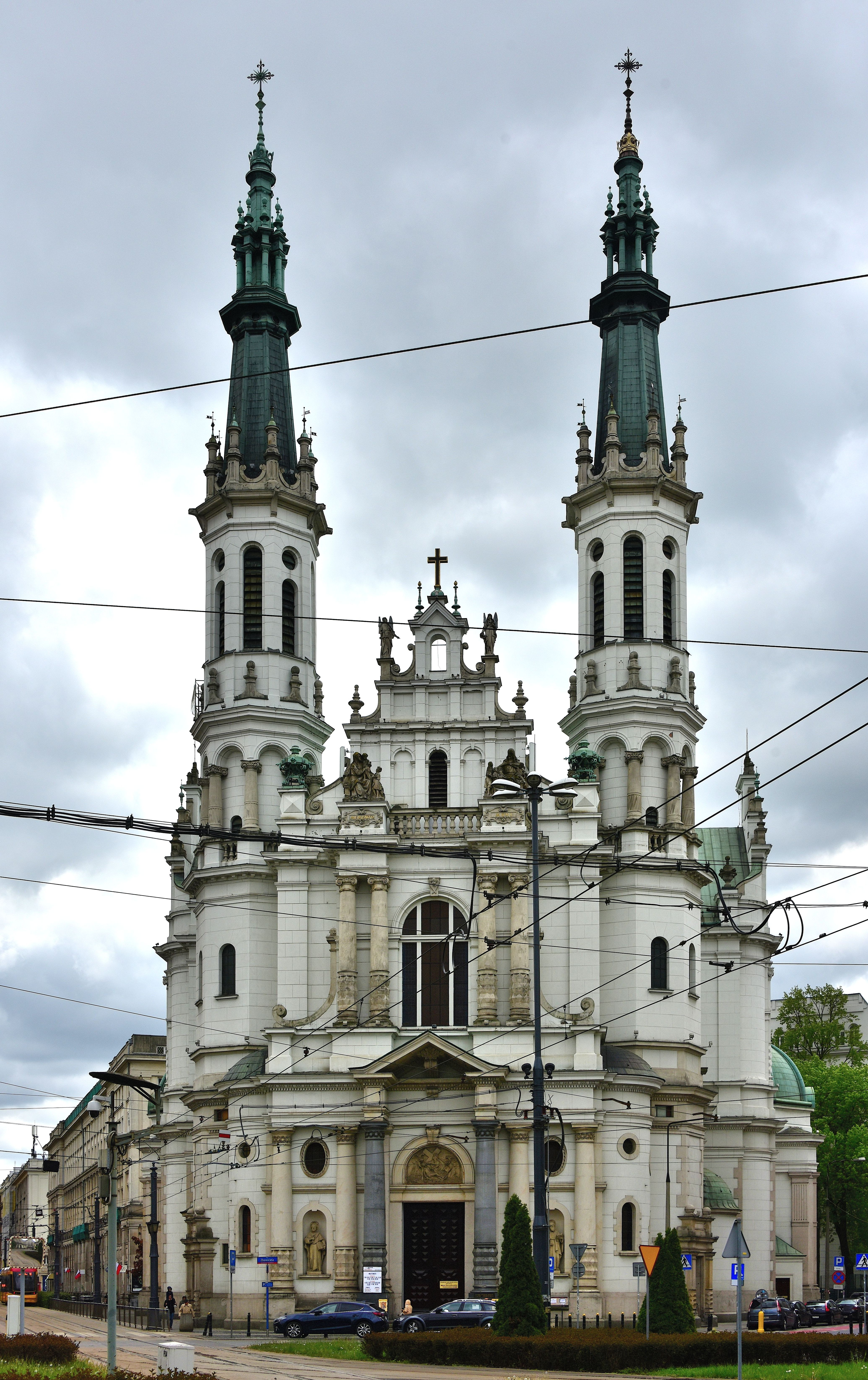 Kościół Najświętszego Zbawiciela w Warszawie